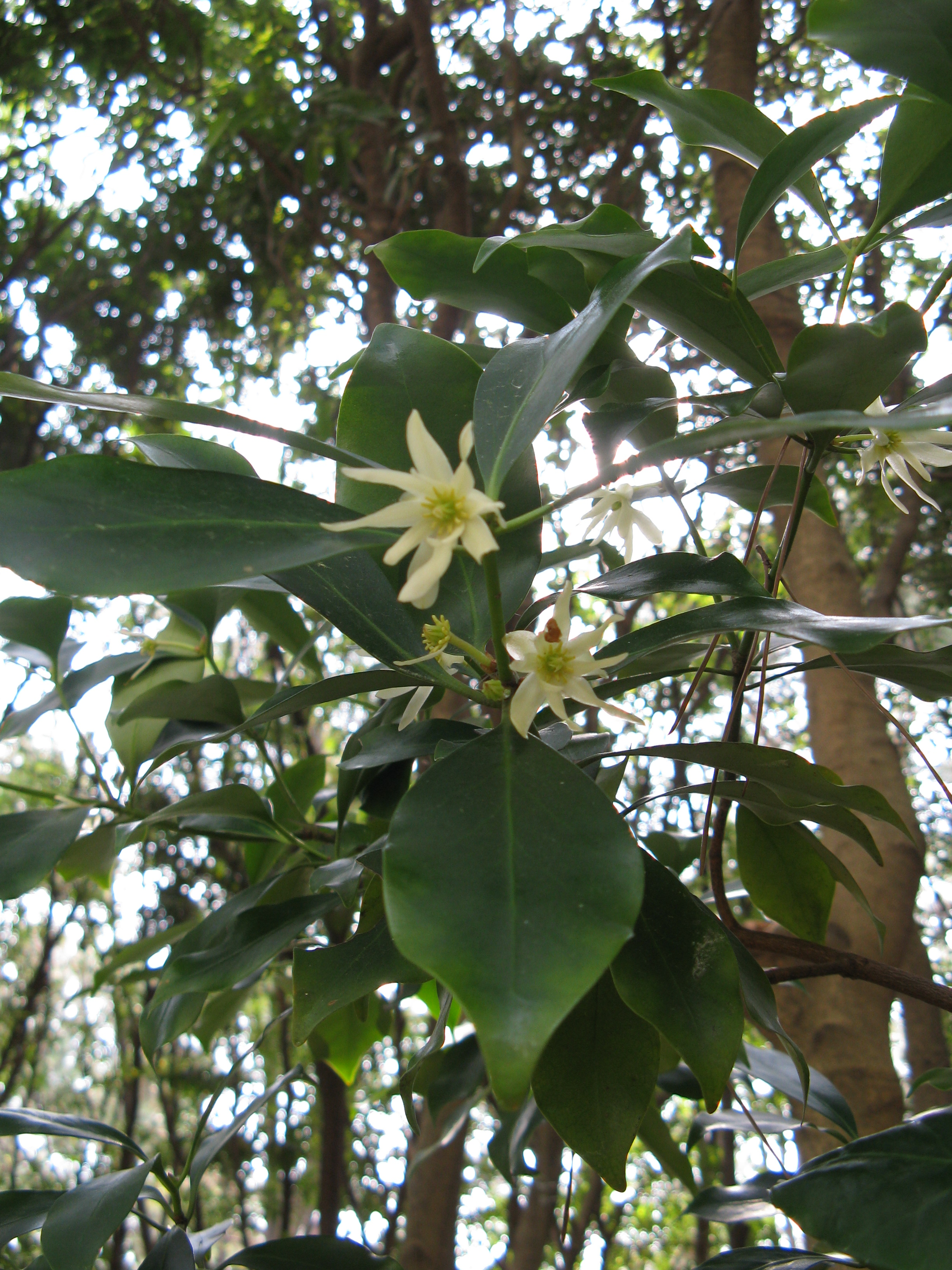 Illicium anisatum